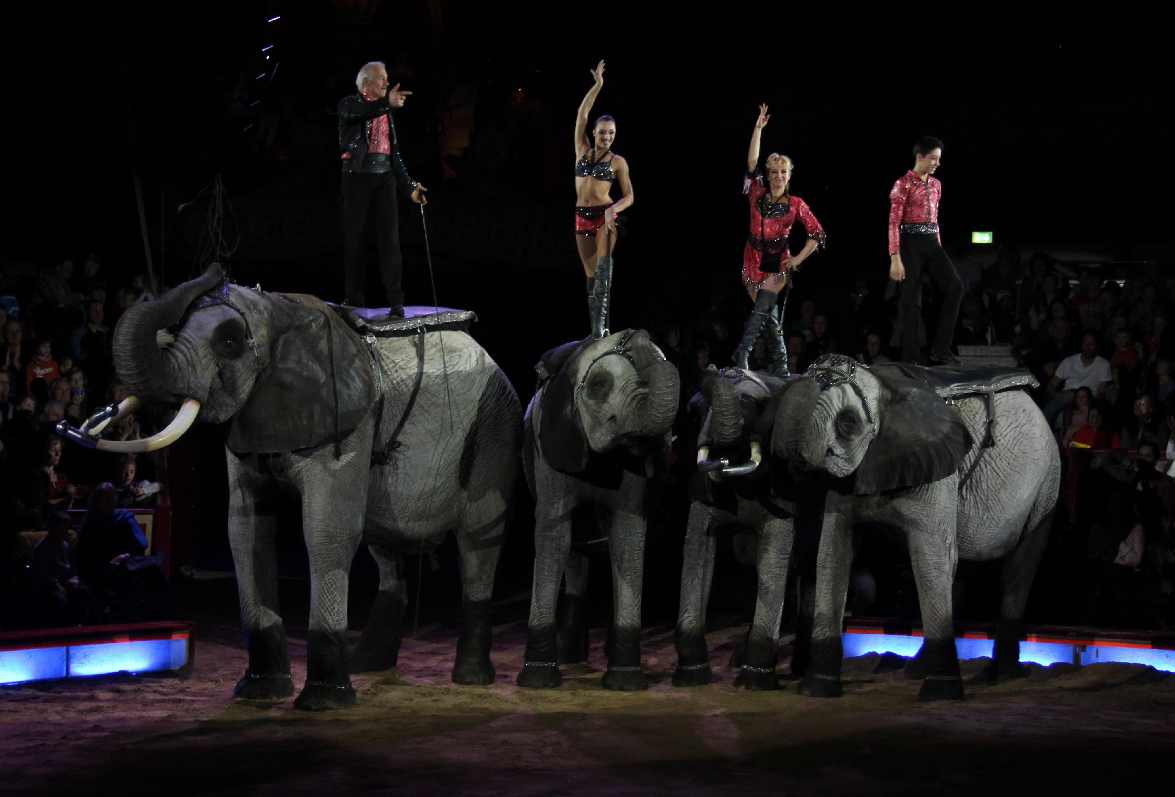 Familie Rene Casselly mit ihren Elefanten im Zirkus